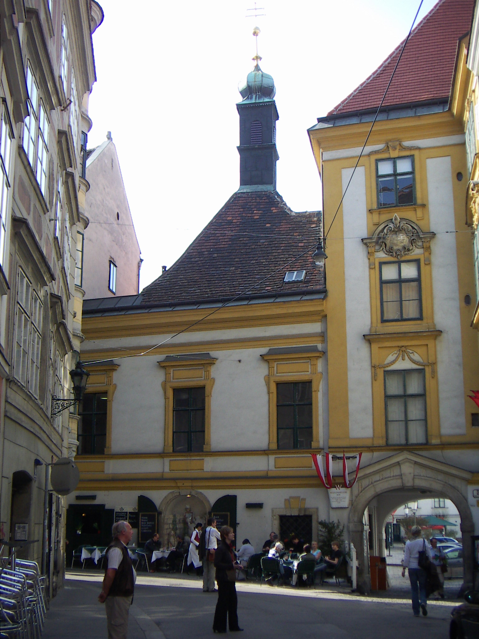 Heiligenkreuzerhof, Bernardikapelle, von der Schönlaterngasse aus im Dachbereich erkennbar